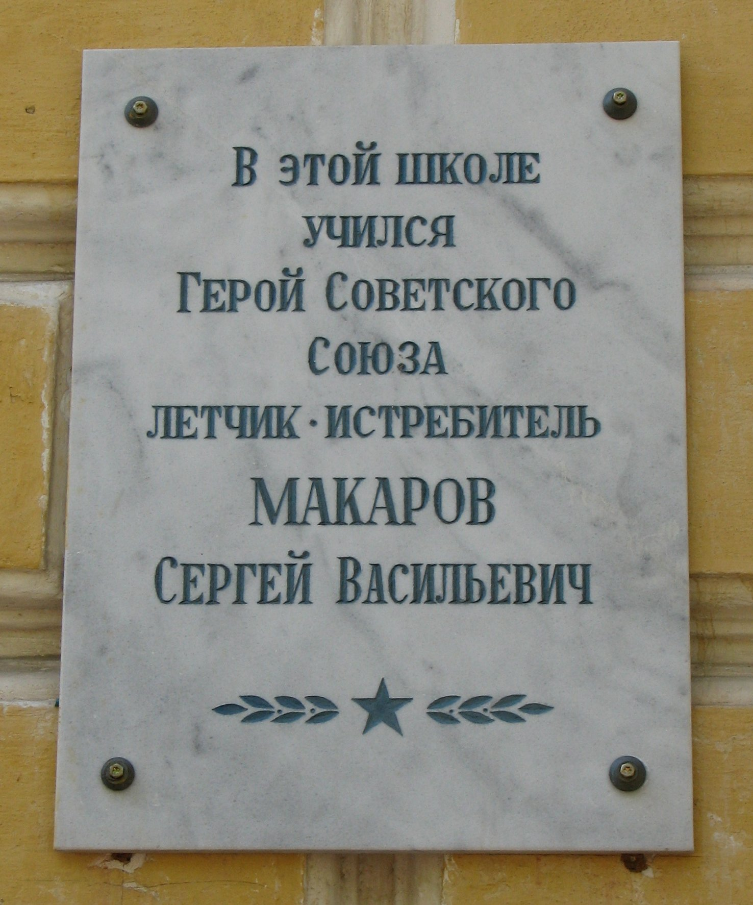 Мемориальная доска, посвящённая Сергею Васильевичу Макарову. Школа № 4, Гатчина